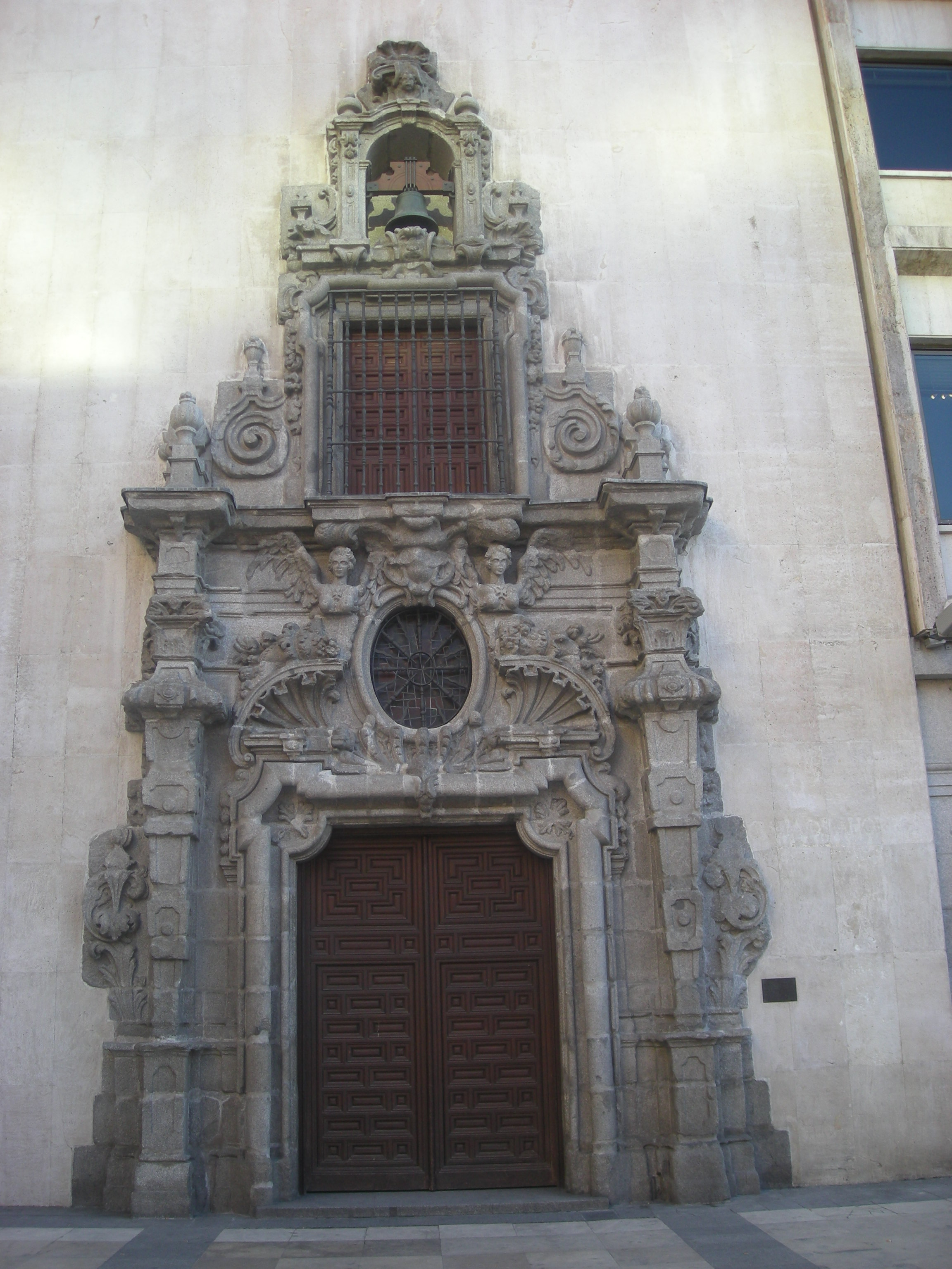 Fachada del antiguo Palacio del Marqués de Villena, primera sede de la Real Academia Española; Plaza de las Descalzas, Madrid, España.